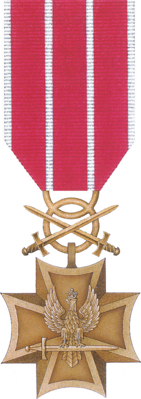 Wojskowy Krzyż Zasługi z Mieczami. Awers.